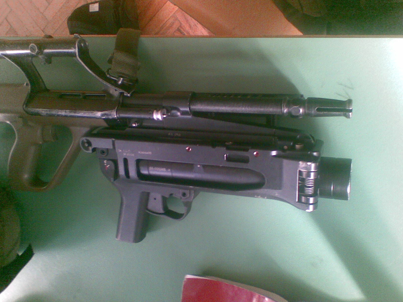 Steyr AUG A1 mit Gewehrgranatgerät AG-C, ein Derivat des AG36 von Heckler und Koch.